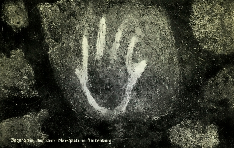 Stein mit eingehauener Hand, Markierung der Hinrichtungsstätte auf dem Markt in Boizenburg/Elbe.